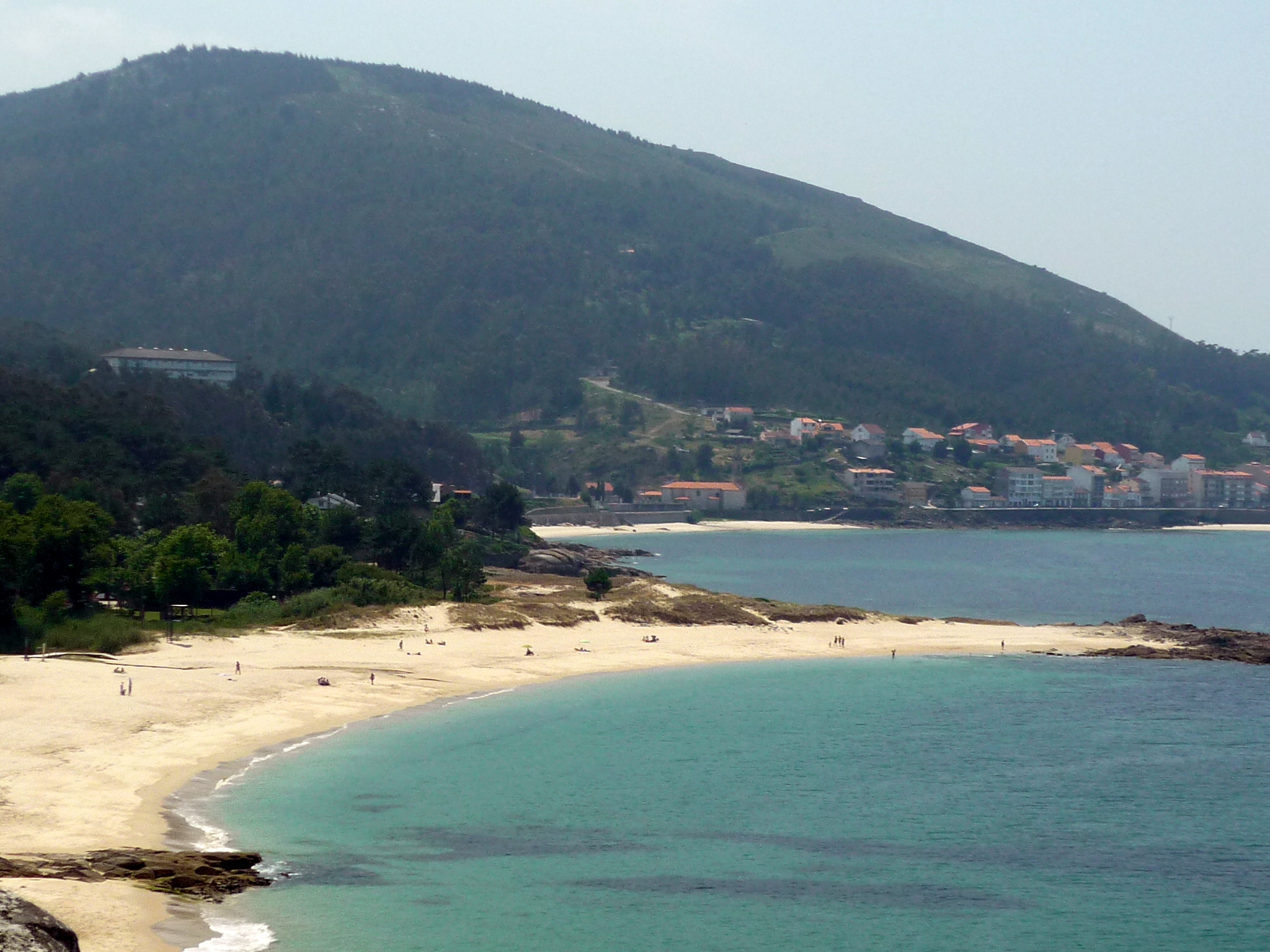 Praia de Aguieira, Porto do Son